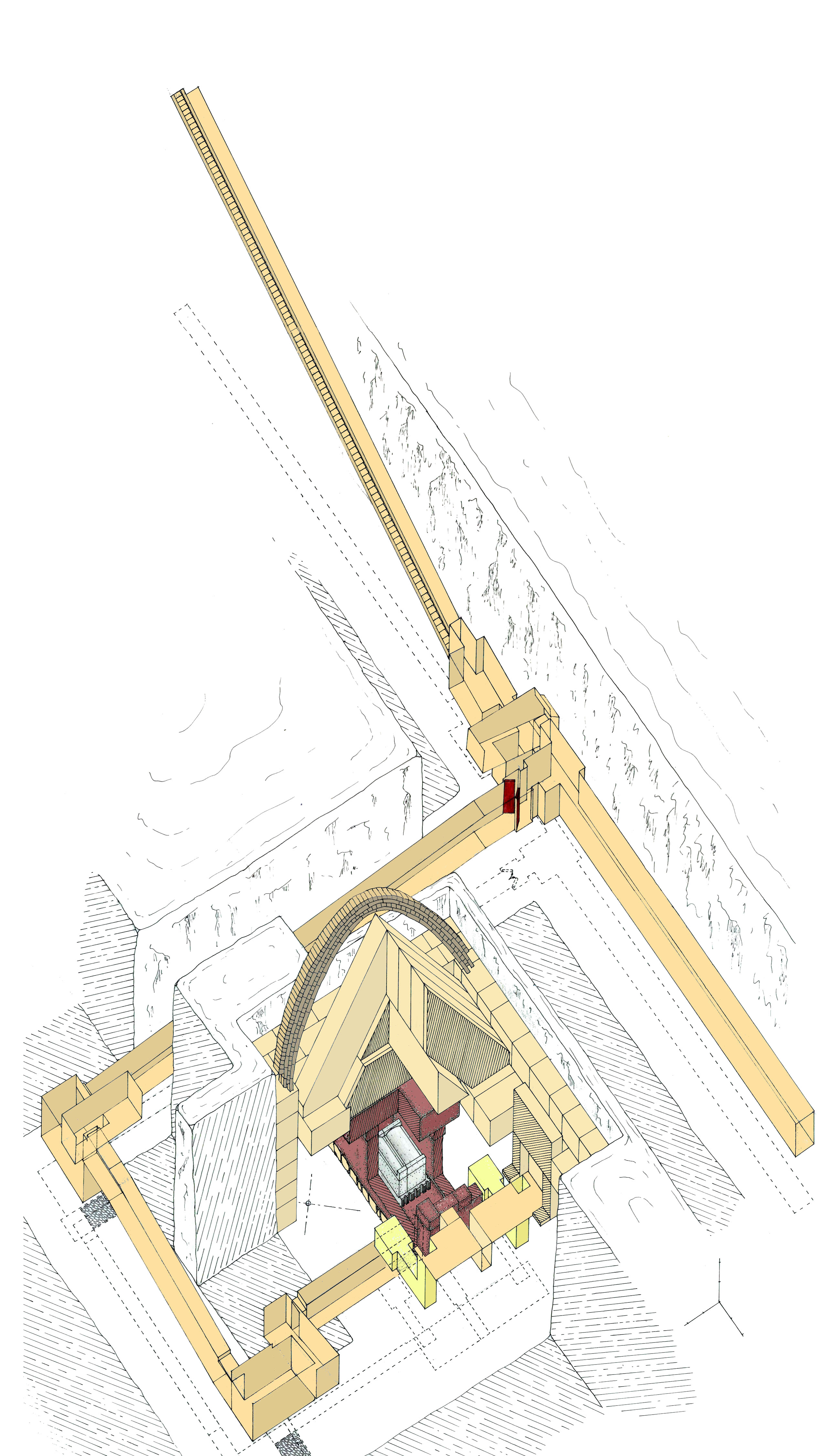 Appartements funéraires de la pyramide d'Amenemhat III à Hawara